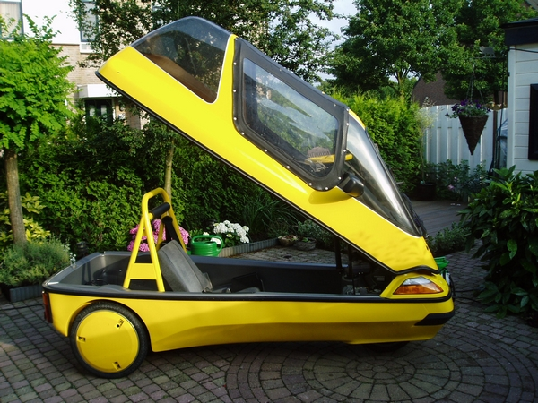 De CityEL open om in te stappen.